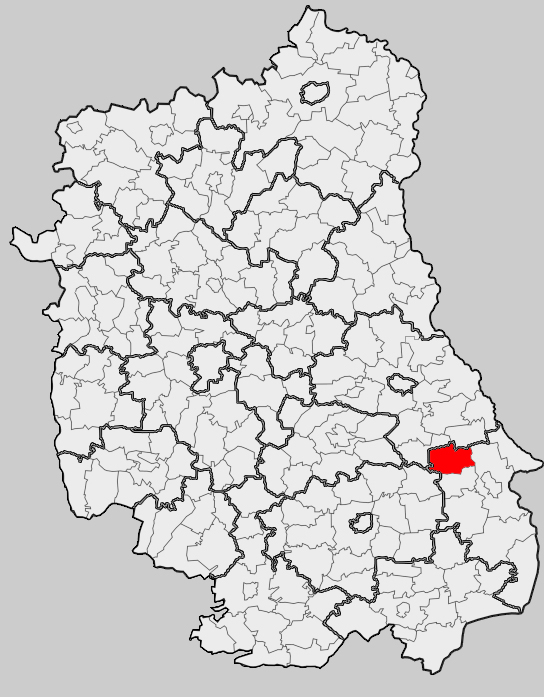 Map of gmina Uchanie, Hrubieszów county, Lublin voivodship Mapa gminy Uchanie, powiat hrubieszowski, województwo lubelskie